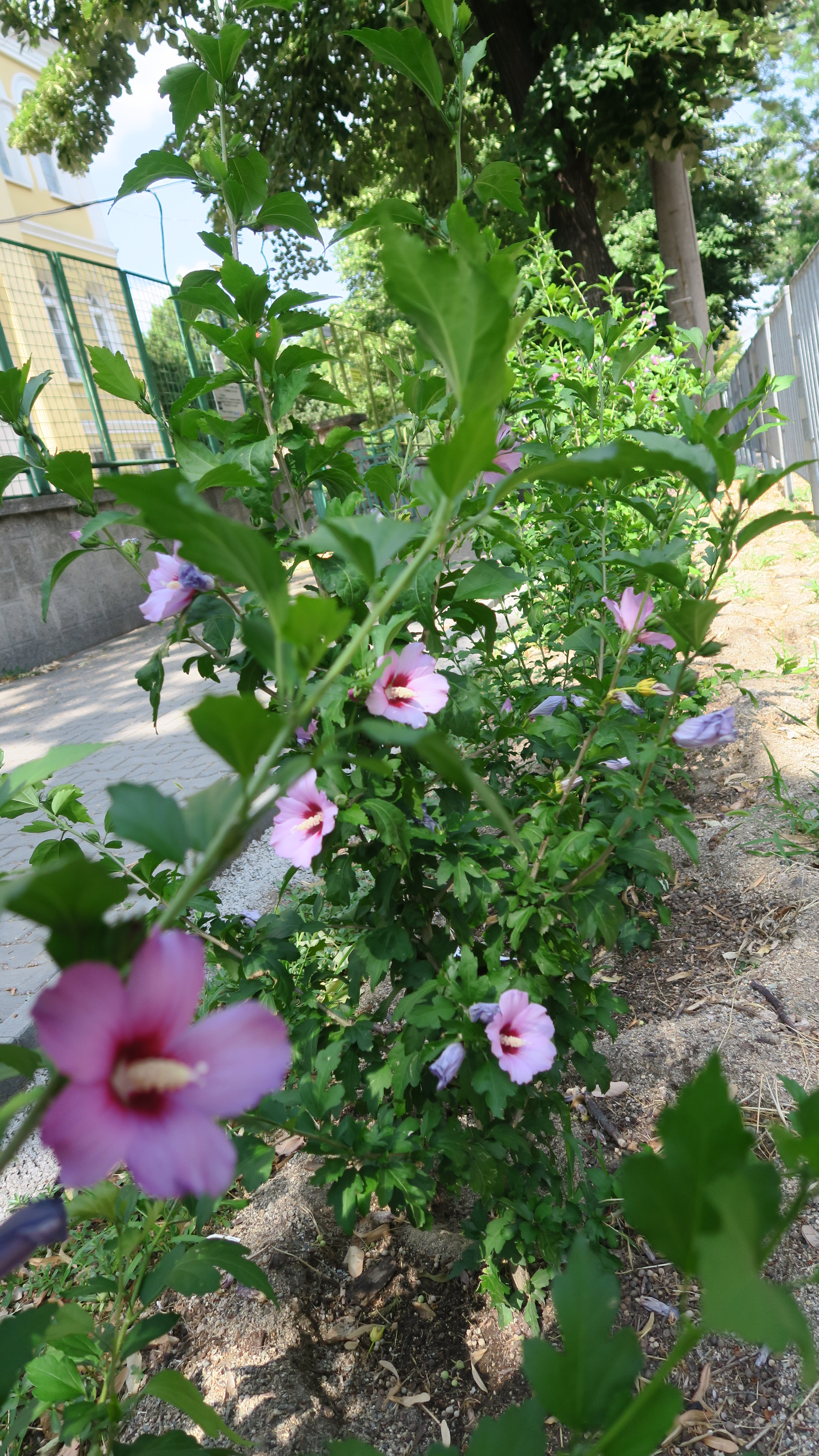 Двугодишна дървовидна ружа, засадена в крайтротоарното пространство на Второ ОУ „Петко Рачов Славейков“ – Стара Загора.